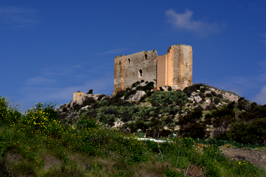 Fortificazione di epoca federiciana a pochi chilometri da Gela